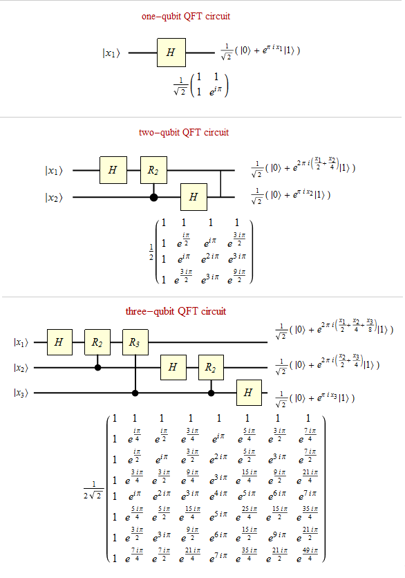 Ví dụ biến đổi Fourier với 1,2,3 qubits